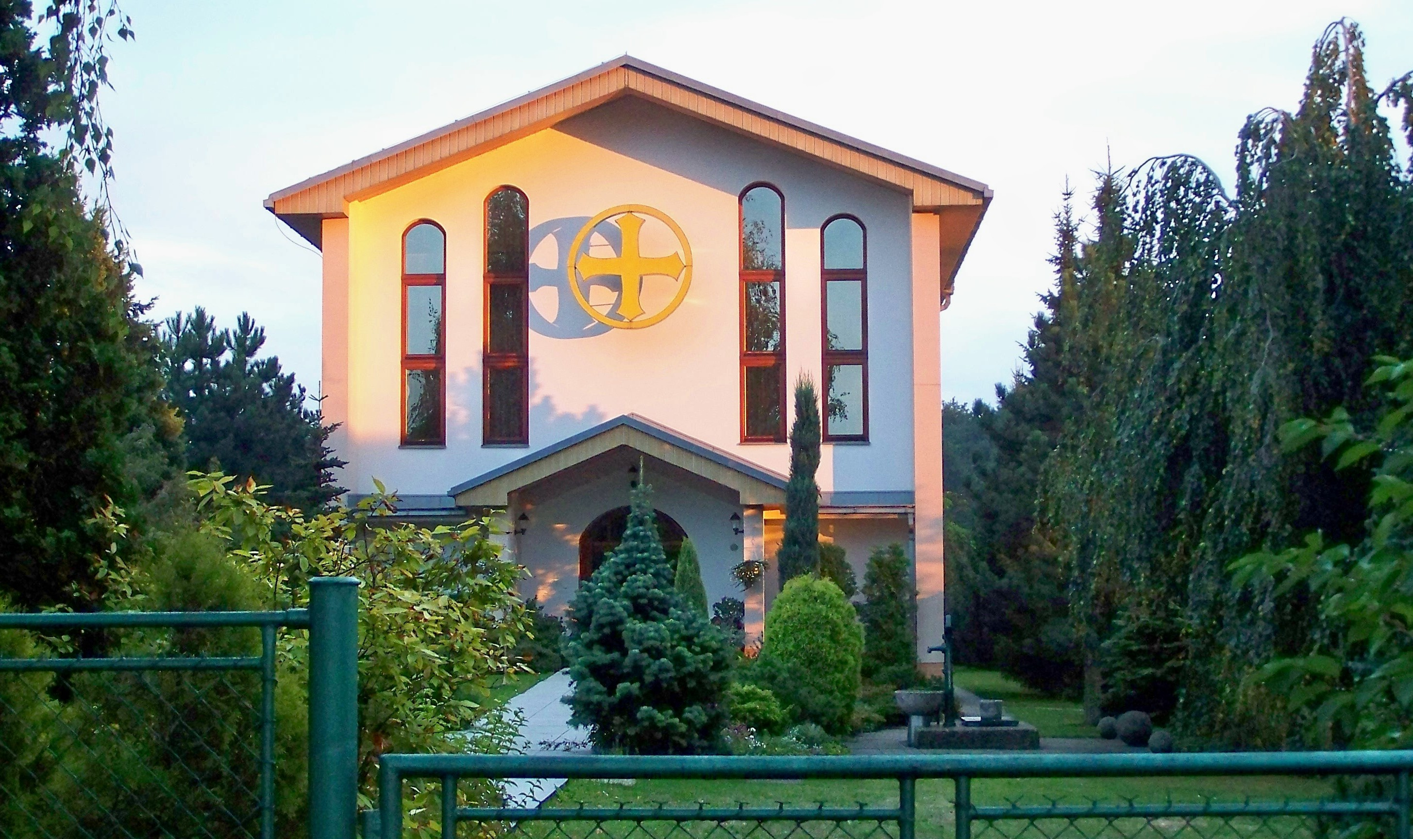 Dům volného křesťanského společenství